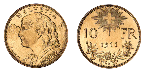 10 CHF Vreneli 1911